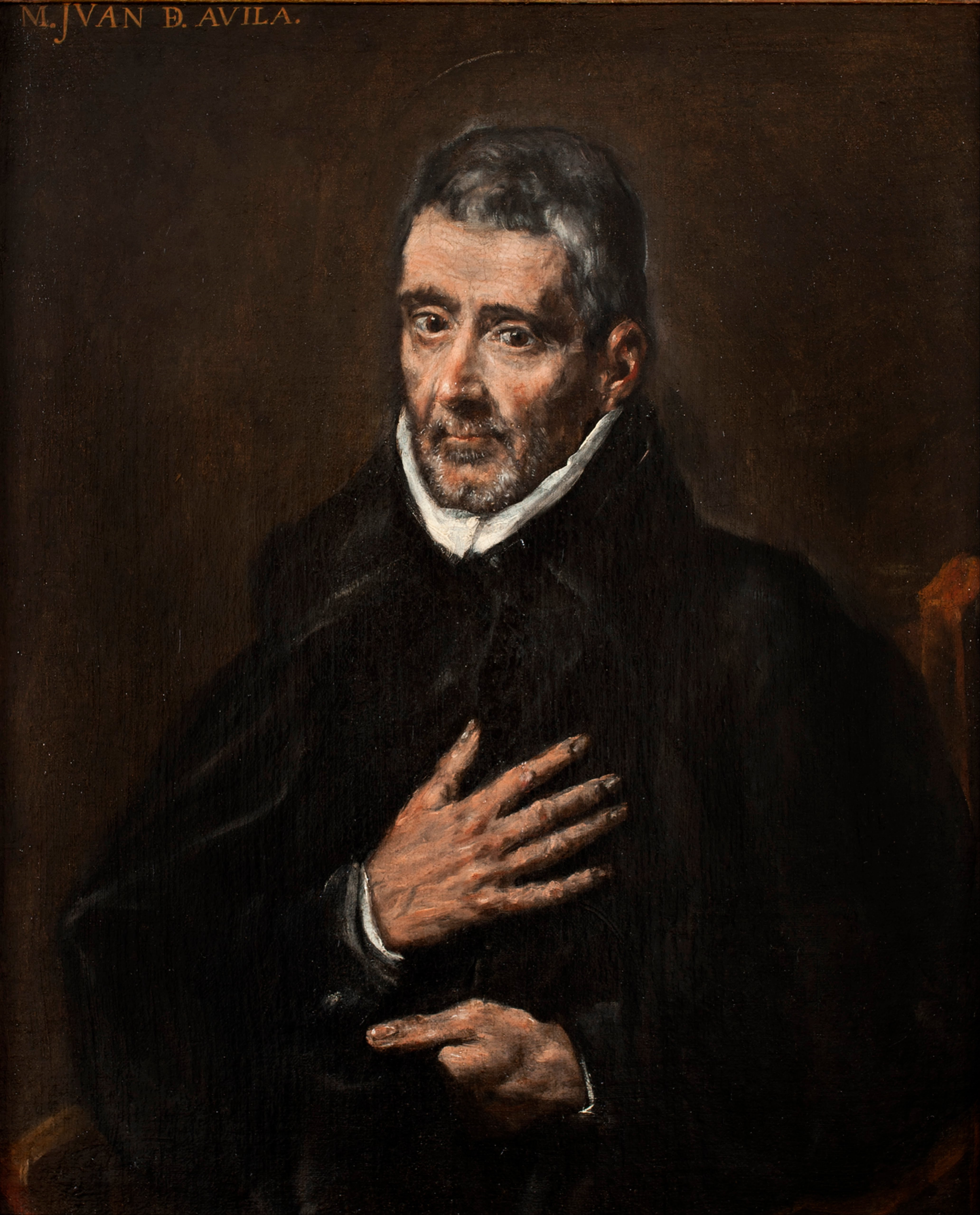 Retrato del sacerdote y escritor español San Juan de Ávila (1500-1569), patrono del clero español y doctor de la Iglesia.